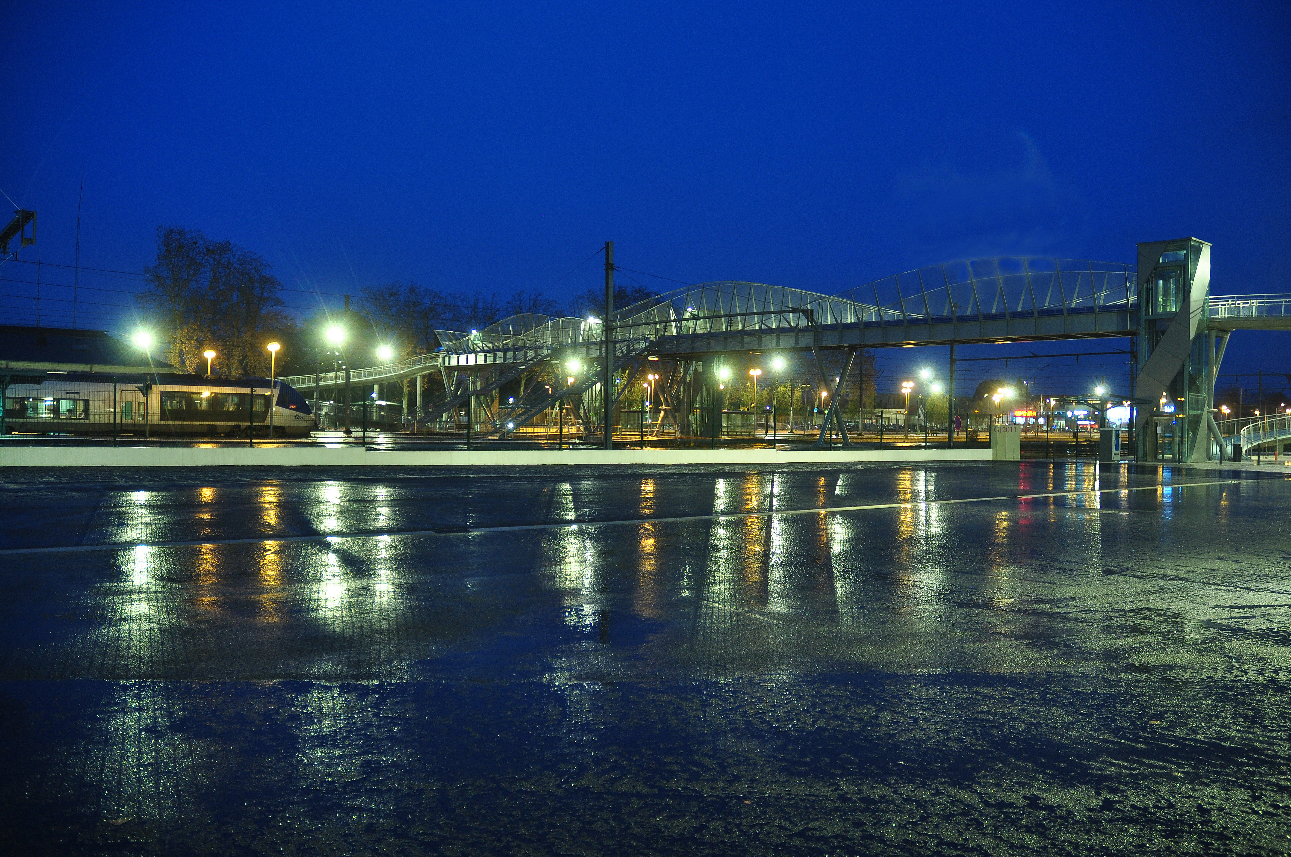 Moulins-sur-Allier (Allier, France) : La nouvelle gare SNCF. J'ai réalisé cette photo en pose. La nuit était presque totale. Décembre 2011 avant la tempête JOACHIM qui a traversé la FRANCE le lendemain. Il pleut donc en ce début de nuit. Nous voyons la passerelle nouvellement construite qui permet de se rendre de l'autre côté des voies, sur la commune d'YZEURE. Cette photo fait partie de la collection "patrimoine Français" réalisée par Gérard JOYON.